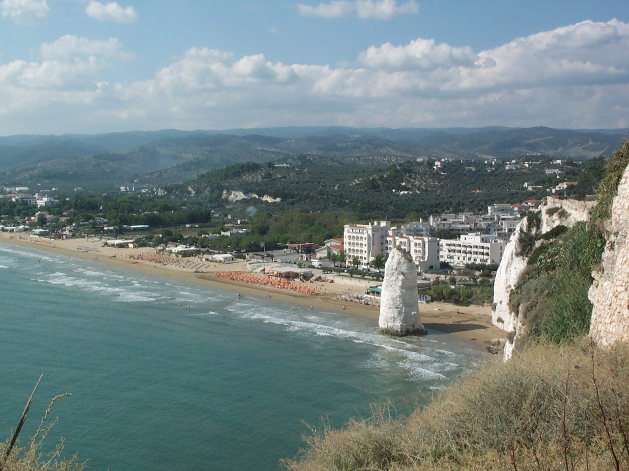 Vieste - Spiaggia con faraglione